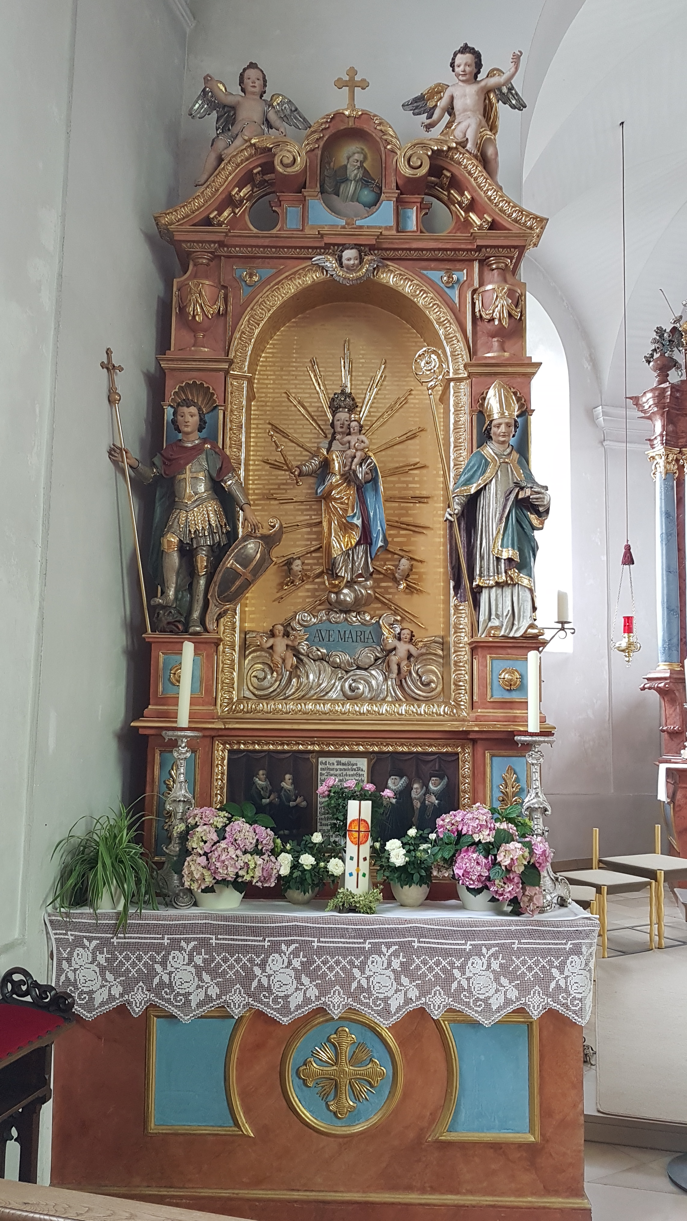 St. Ulrich (Wangen bei Starnberg)